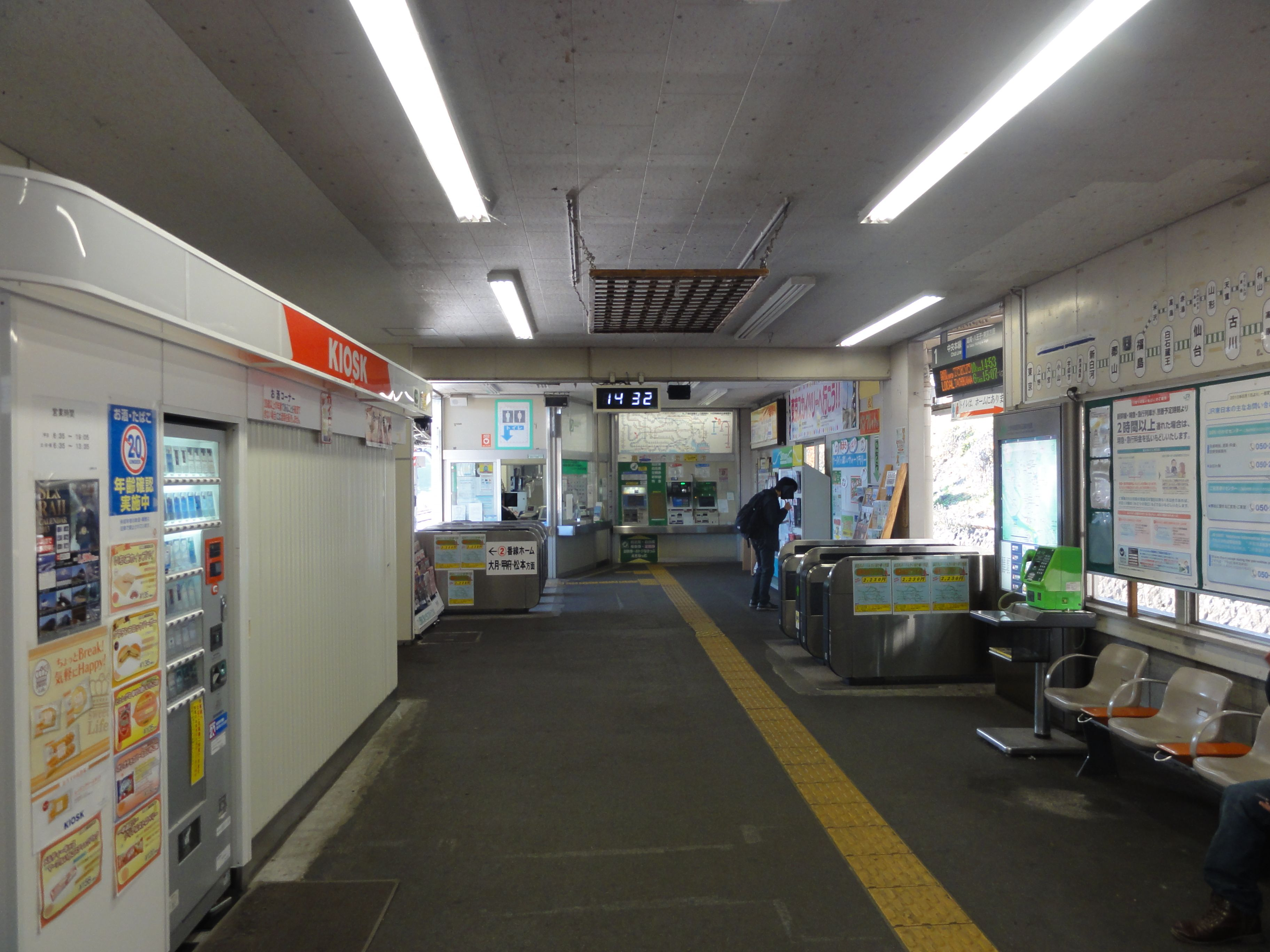 上野原駅改札